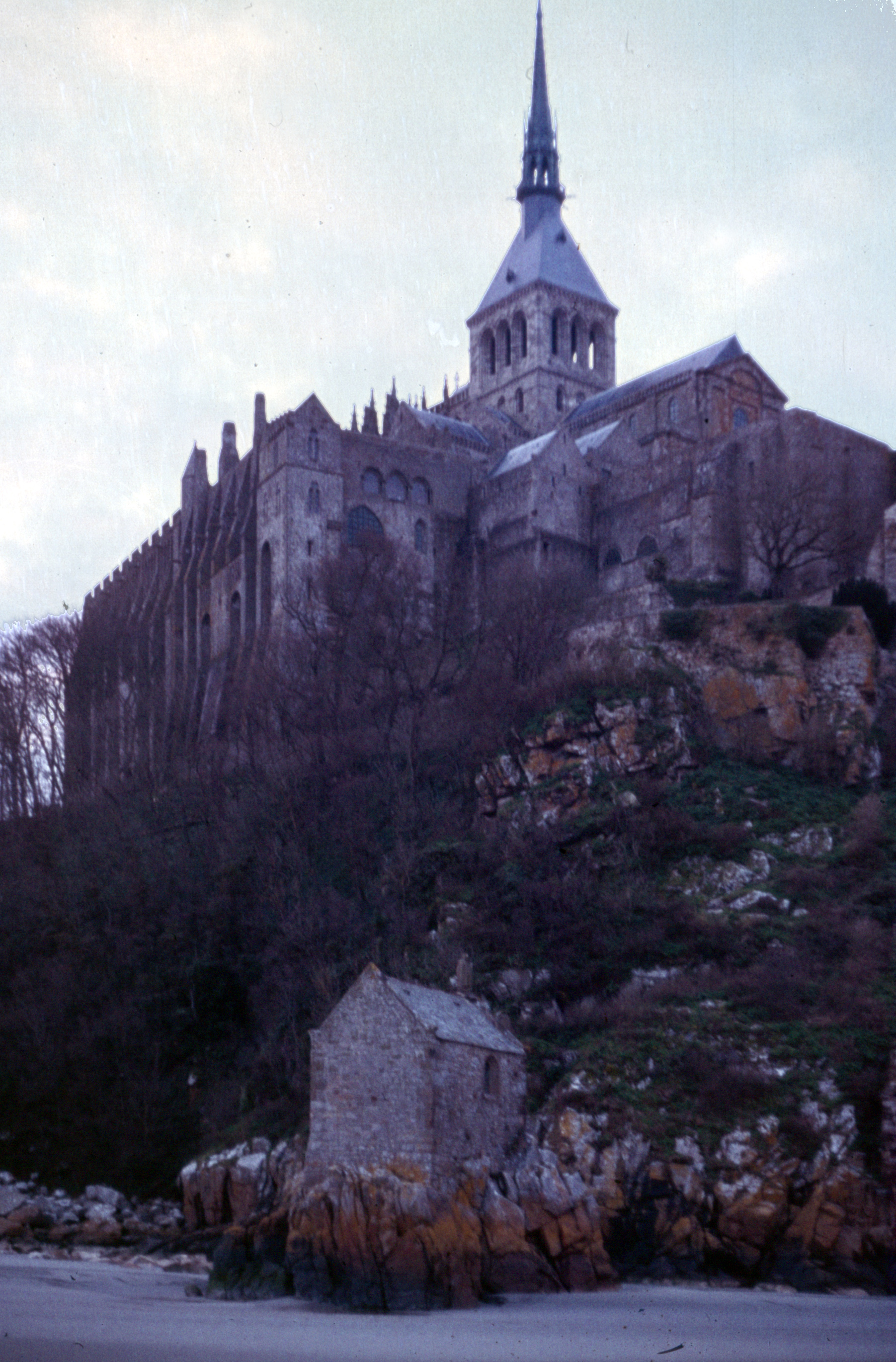 Mont-Saint-Michel 1978